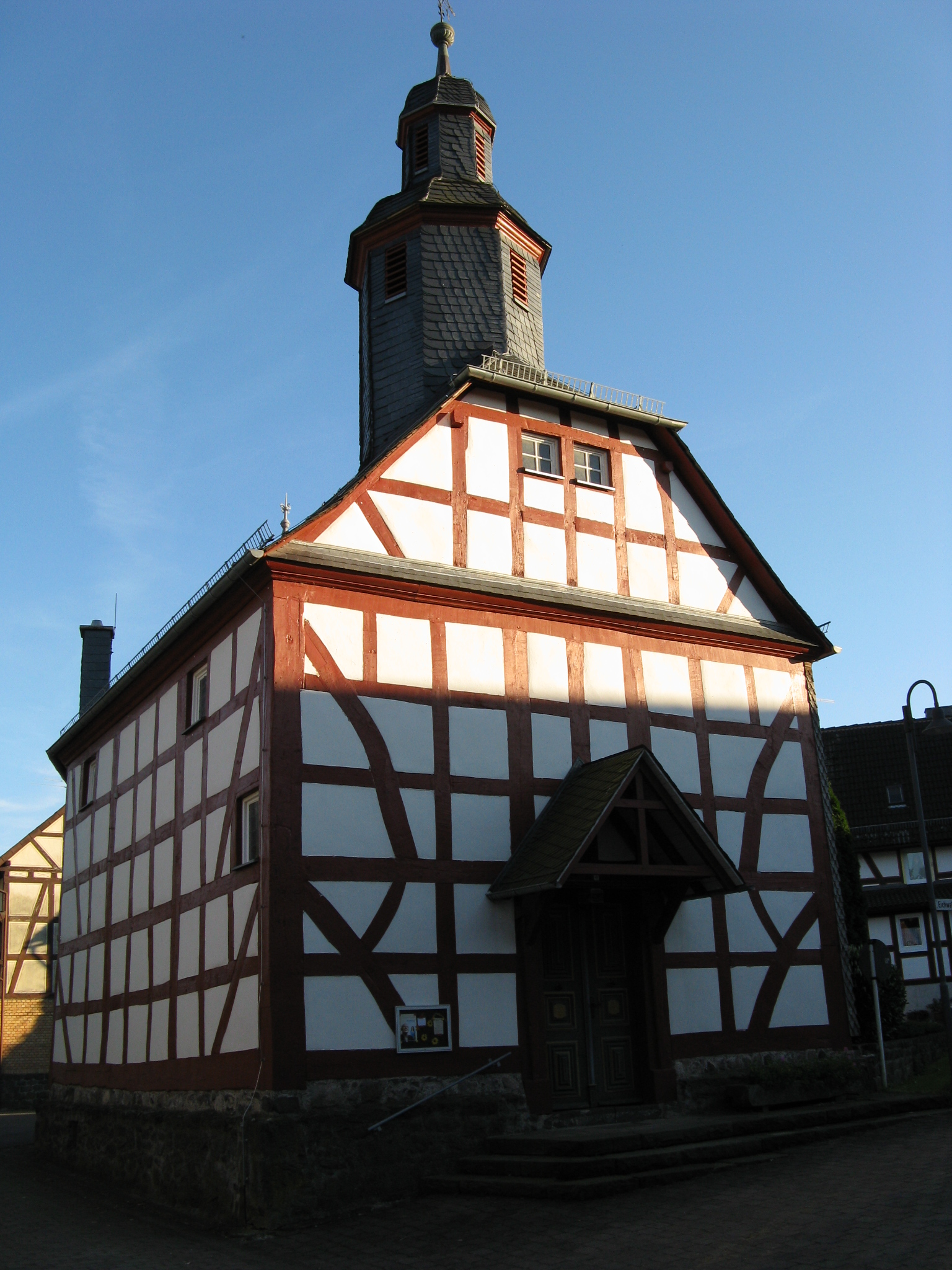 Church of Unter-Seibertenrod, Vogelsberg/Germany